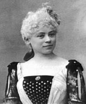 Eudoxie Laurent en 1872, photographie de Disdéri extraite du Journal général de l'imprimerie et de la librairie.